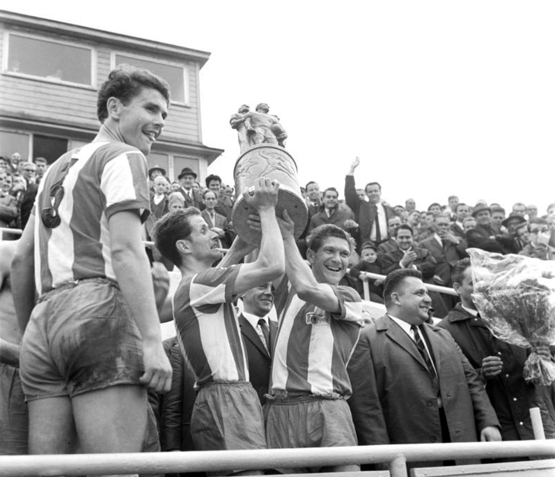 Halle: 17. FDGB-Pokalfinale im Fußball 1. FC Union Berlin gegen FC Carl Zeiss Jena 2:1 am 9.6.1968 Union-Kapitän Ulrich Prüfke (Mitte) und Ralph Quest halten die schwere Bronzestatue ihren Anhängern entgegen. Links: Verteidiger Wolfgang Wruck.